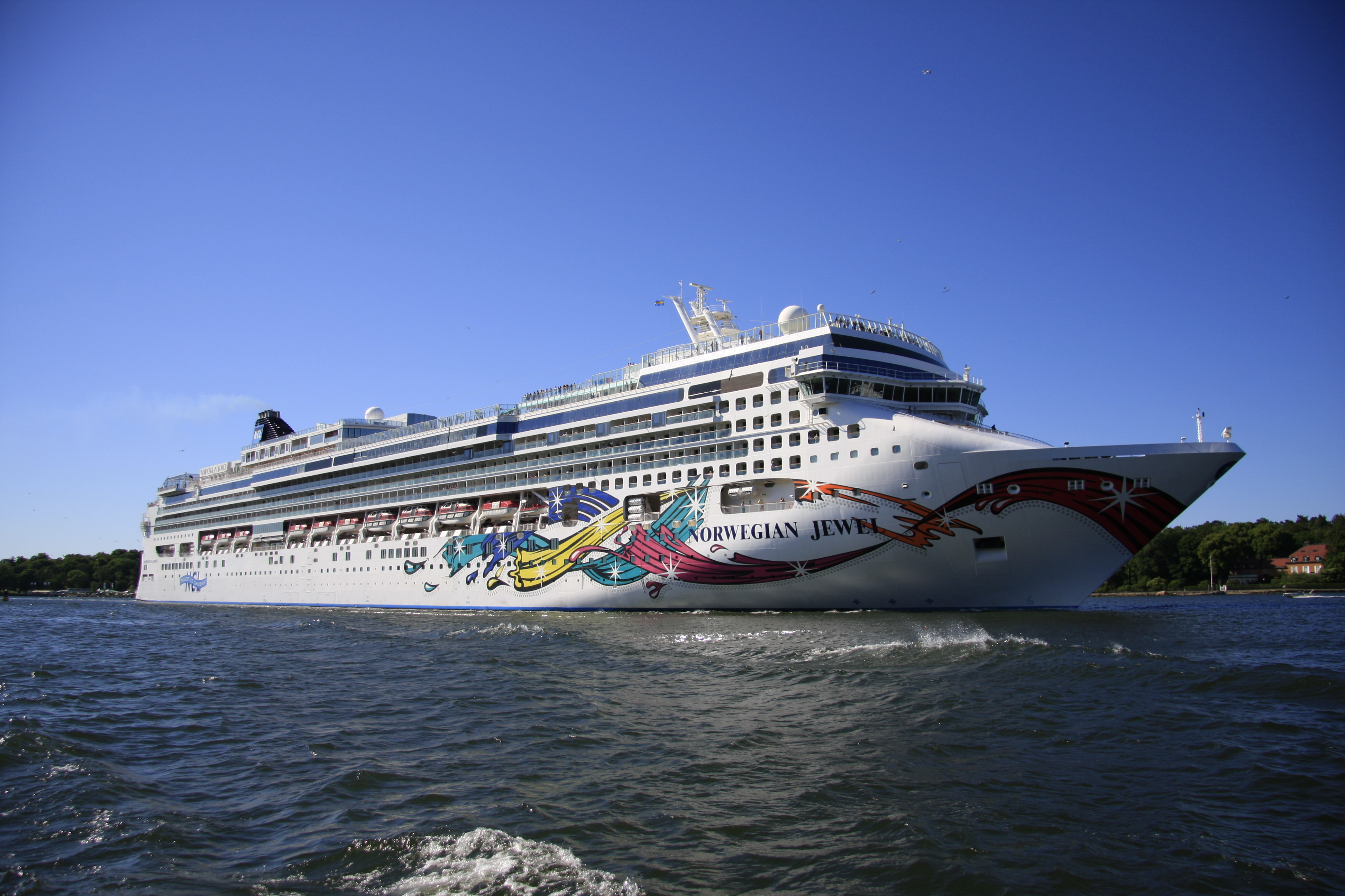 _MG_2862